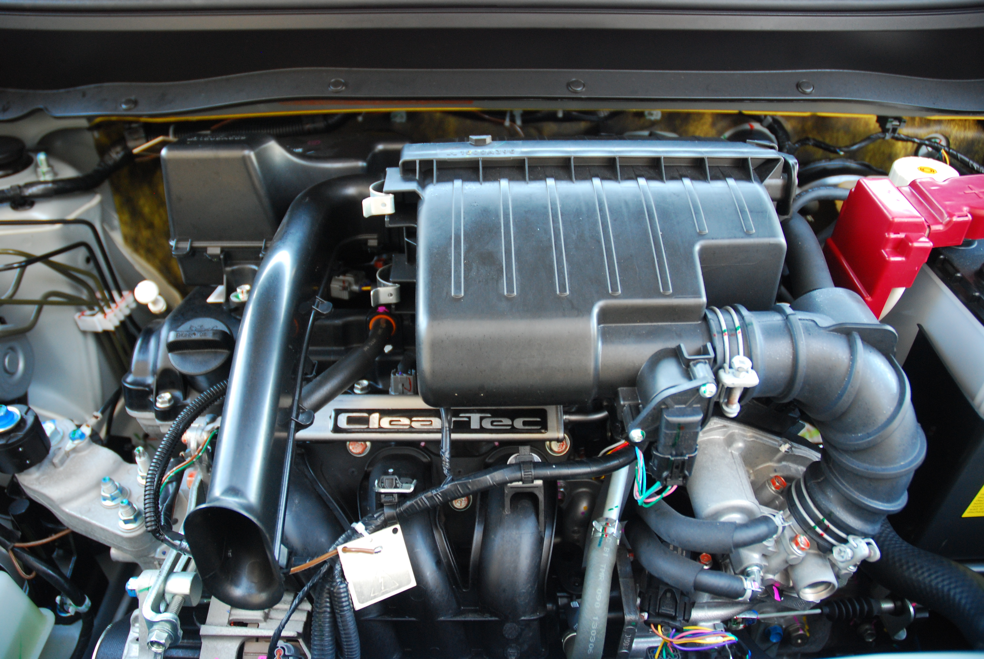 Mitsubishi 3A90 1.0 Mivec Motor van een Nederlandse Space Star Cleartec 2013